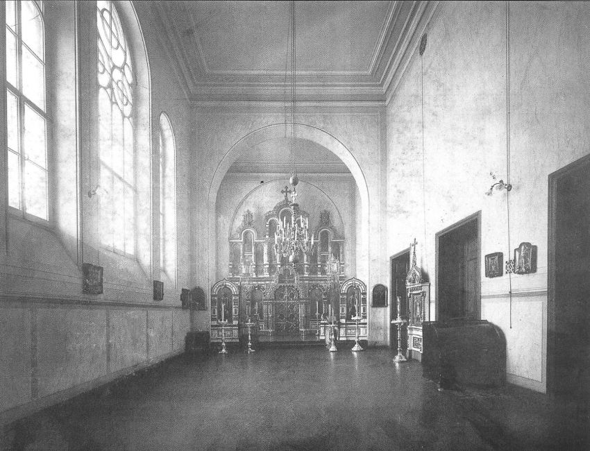 Здание Донской духовной семинарии с домовой церковью Иоанна Богослова